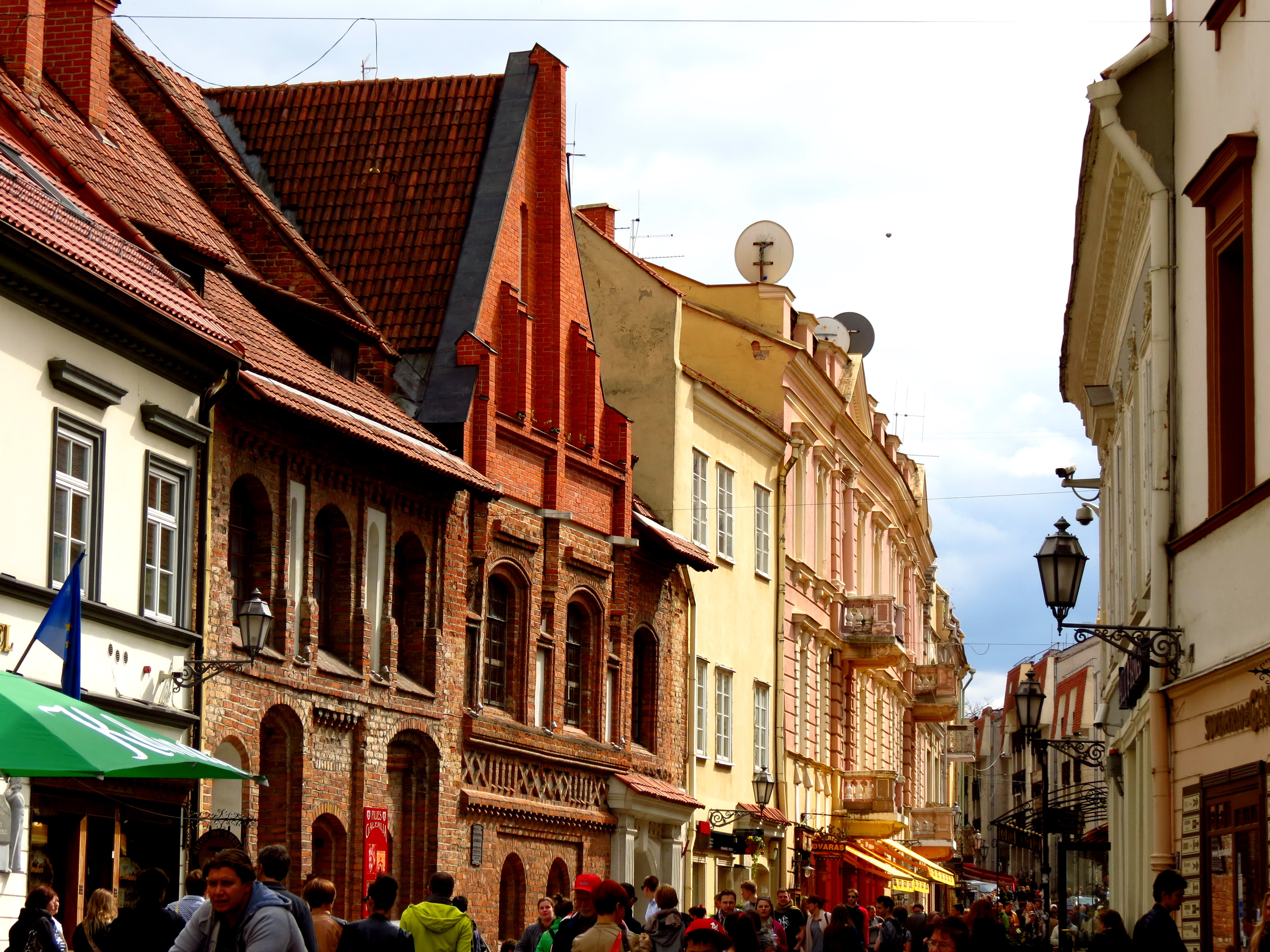 Vue de Vilnius.